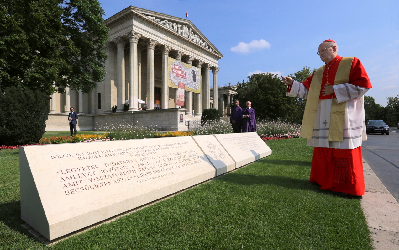 Boldog II. János Pál pápa emléktáblájának szentelése a Budapesten, Hősök terén